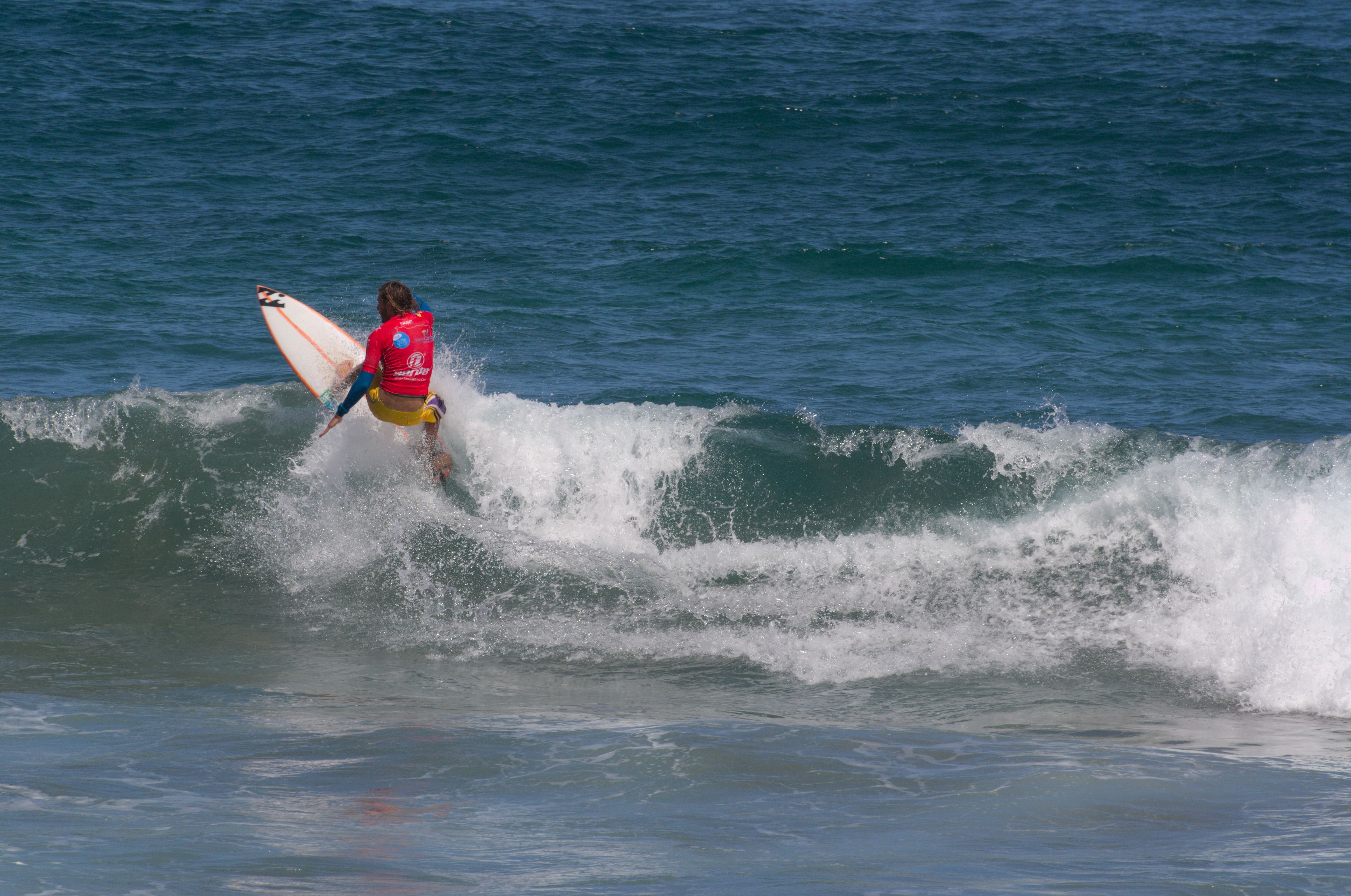 Fotografía realizada durante el torneo "Gran Canaria Santa Pro Junior" en 2012, clasificatorio para el Tour Mundial Junior.